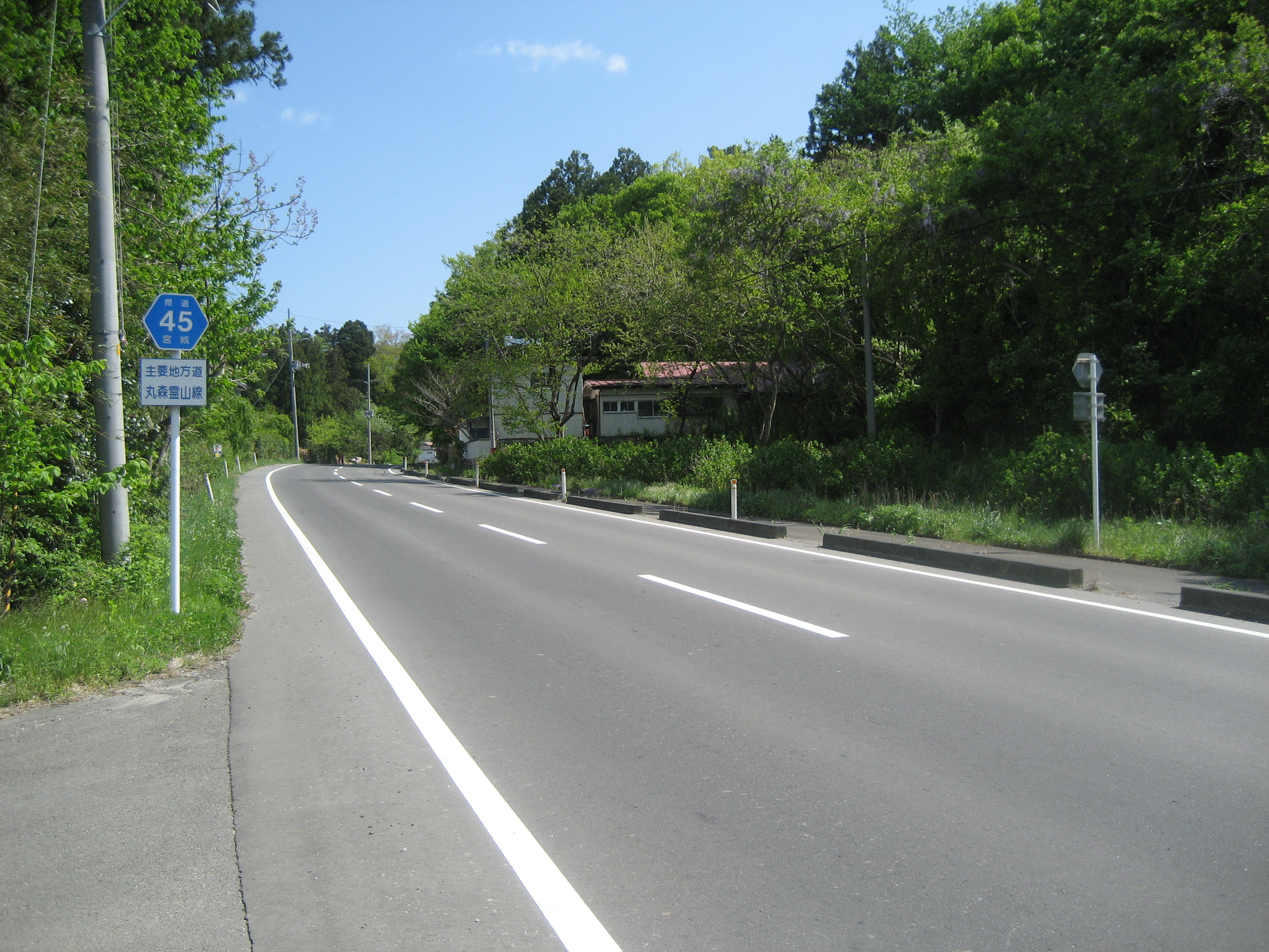 宮城県道45号線丸森町内